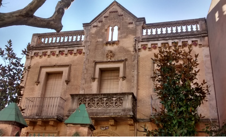 Obra de Aureo Bis